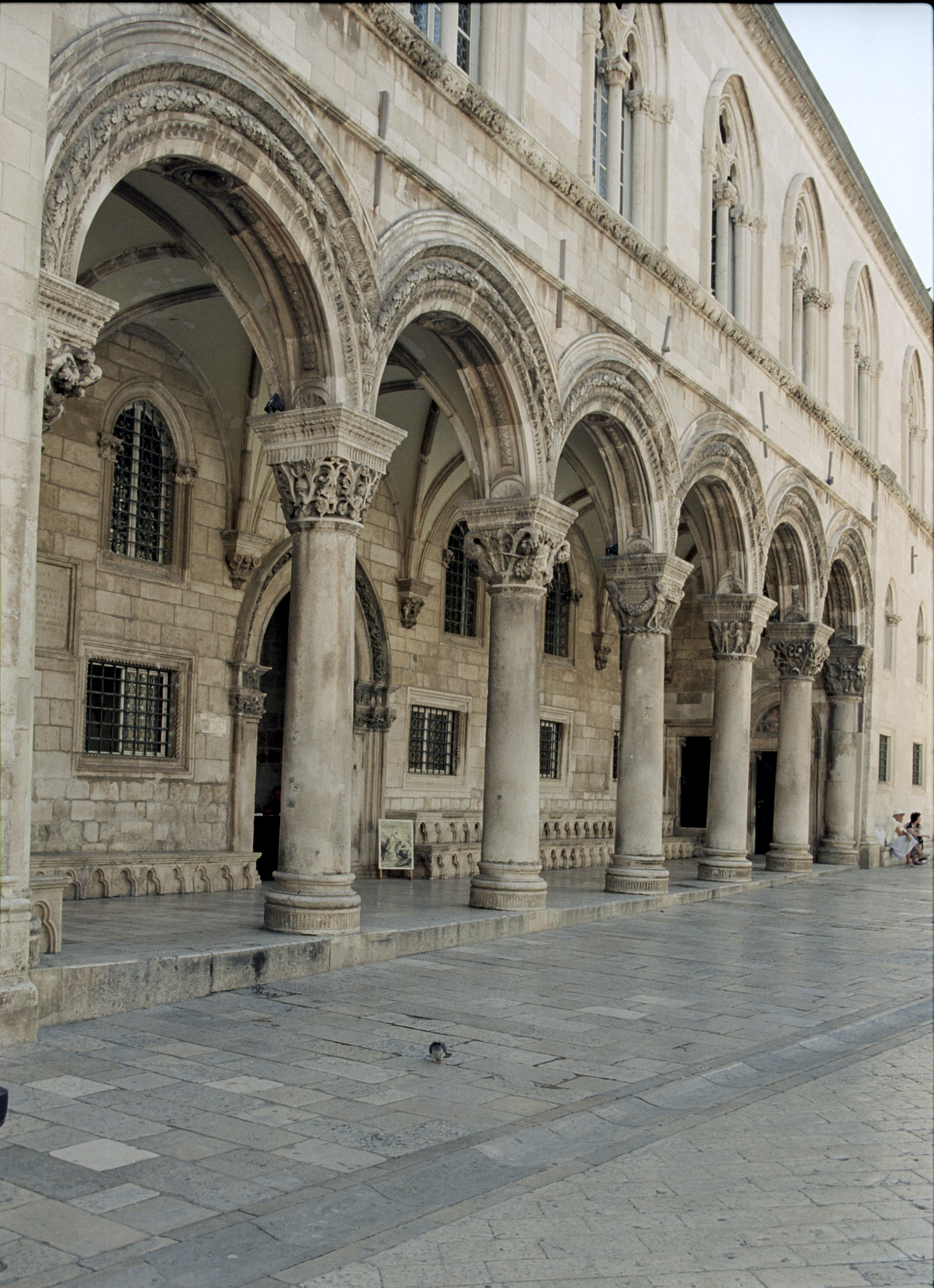 Pałac Rektorów w Dubrowniku